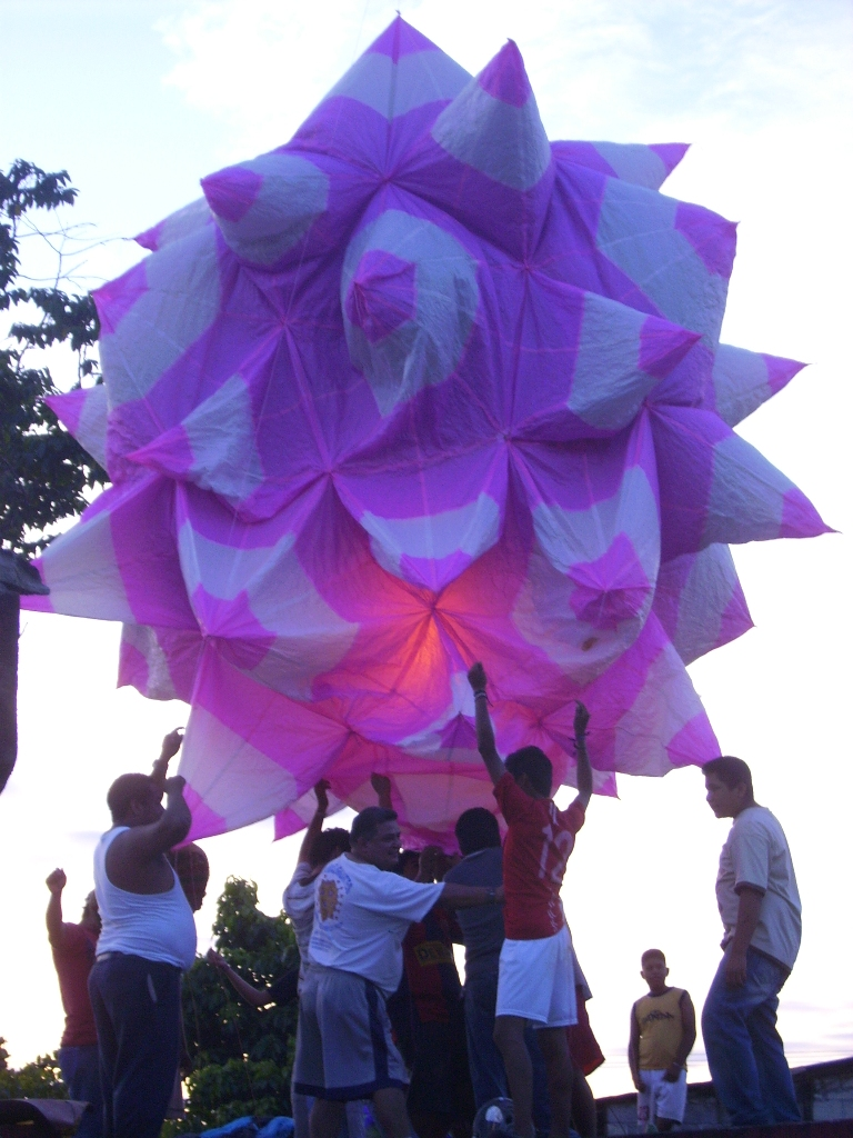 Globo artesanal de San Andrés Tuxtla